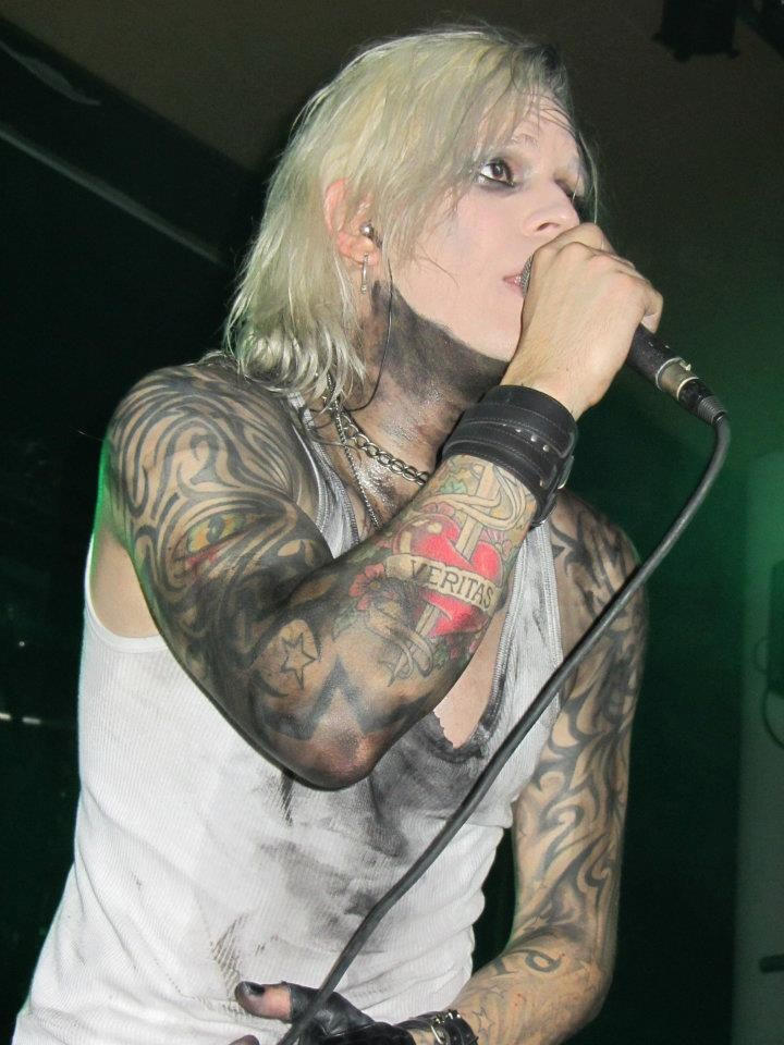 Live-Foto der Band Lord of the Lost